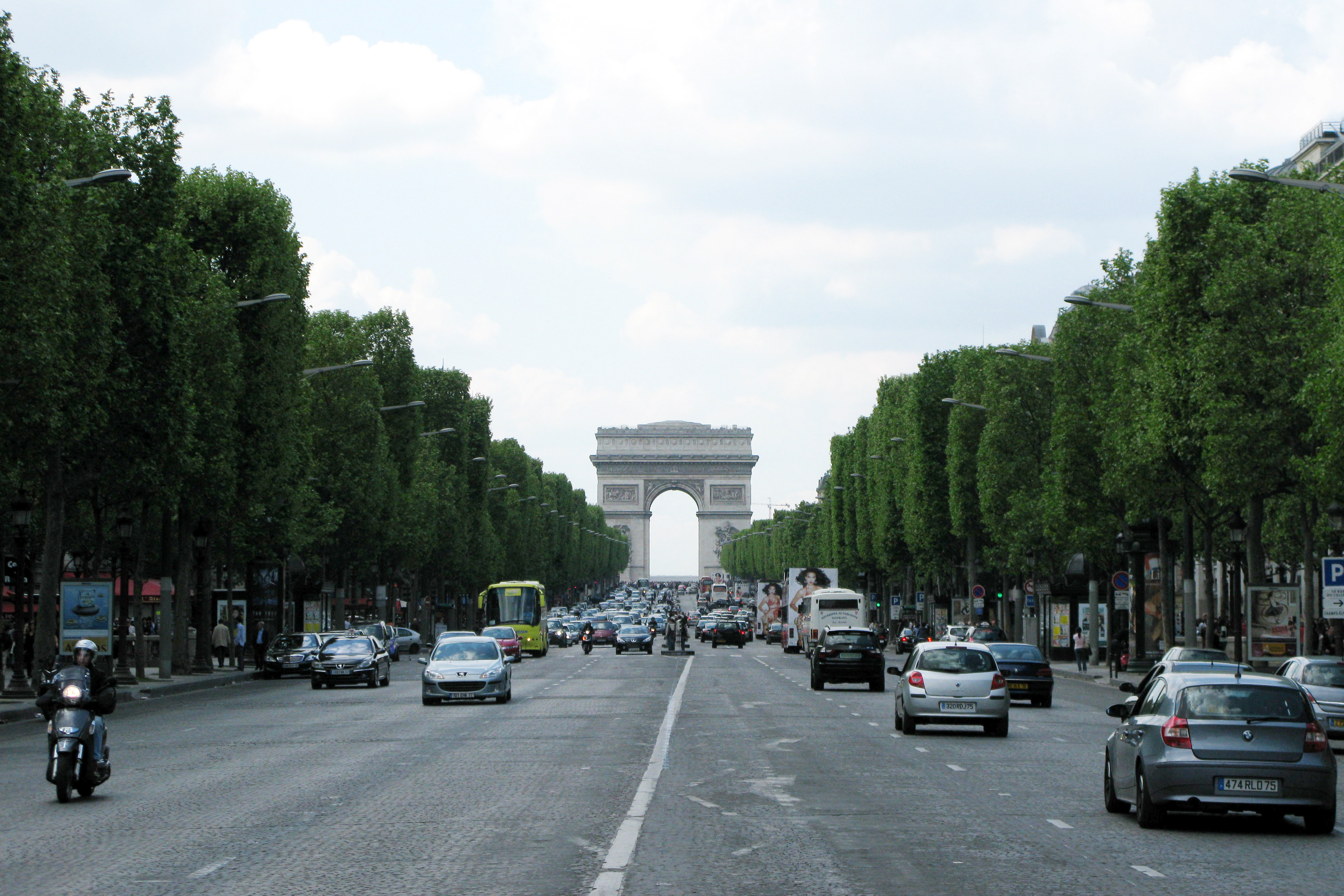 L'avenue des Champs-Élysées, à Paris.